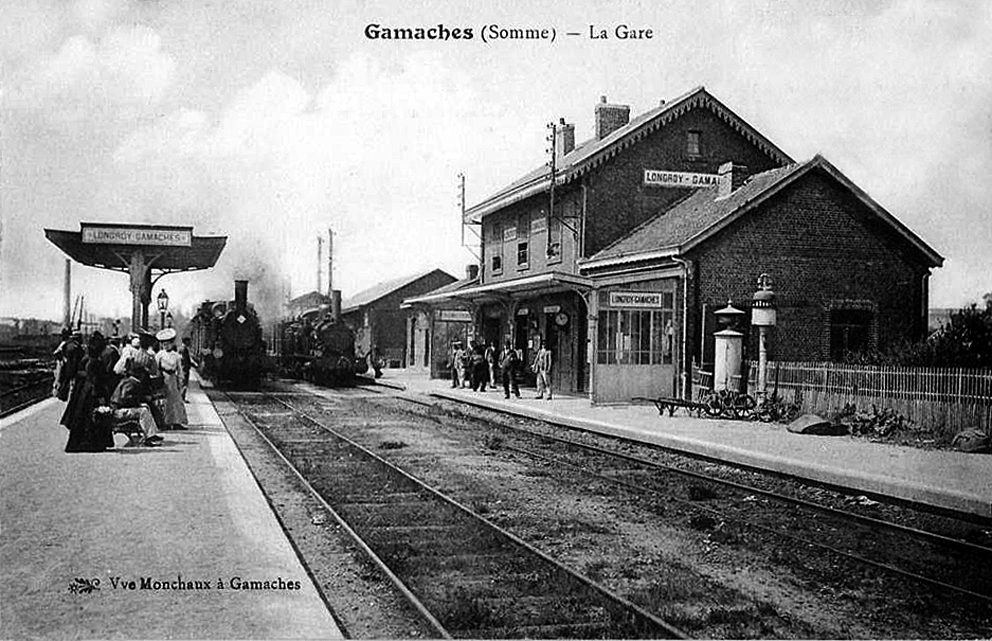 La gare de Longroy - Gamaches au début des années 1900.